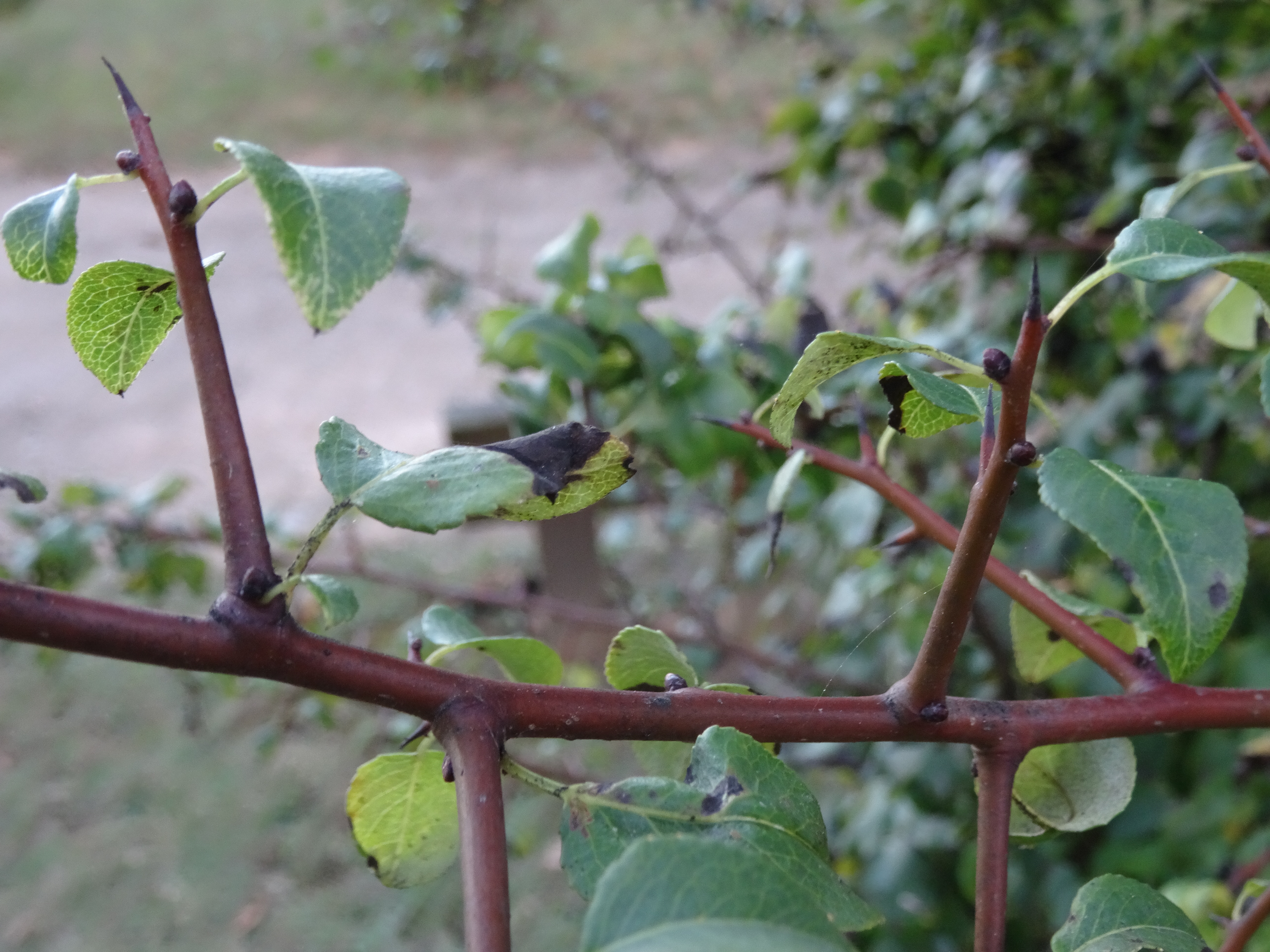 Ver título.